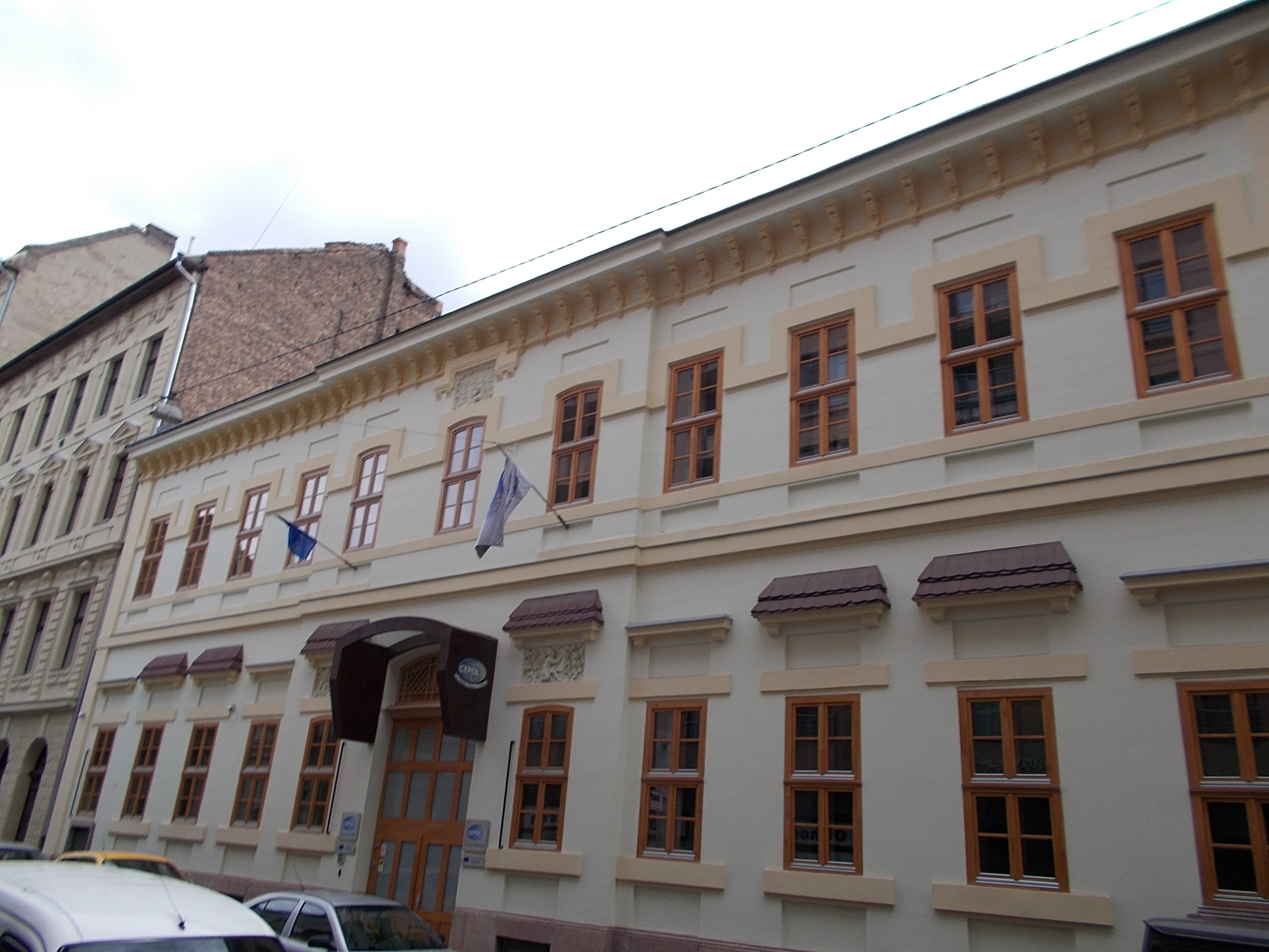 CEPOL. Európai Rendőrakadémia. - Budapest, 6. kerület.Ó utca 27